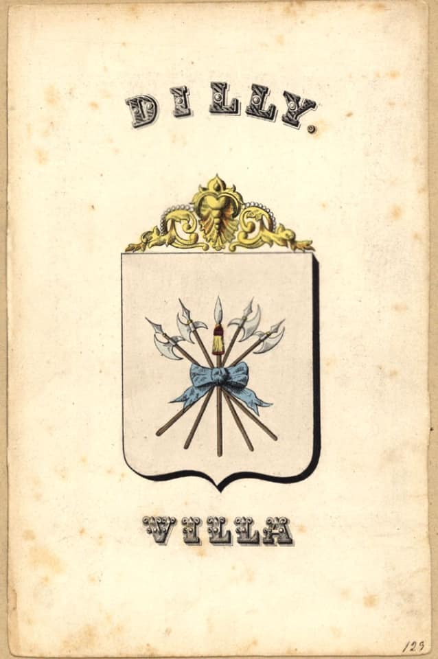 O símbolo original da cidade Dili de antiga publicação, "Brasões das Villas e Cidades de Portugal", de Afonso Dornellas, publicada em fins do século XVIII.